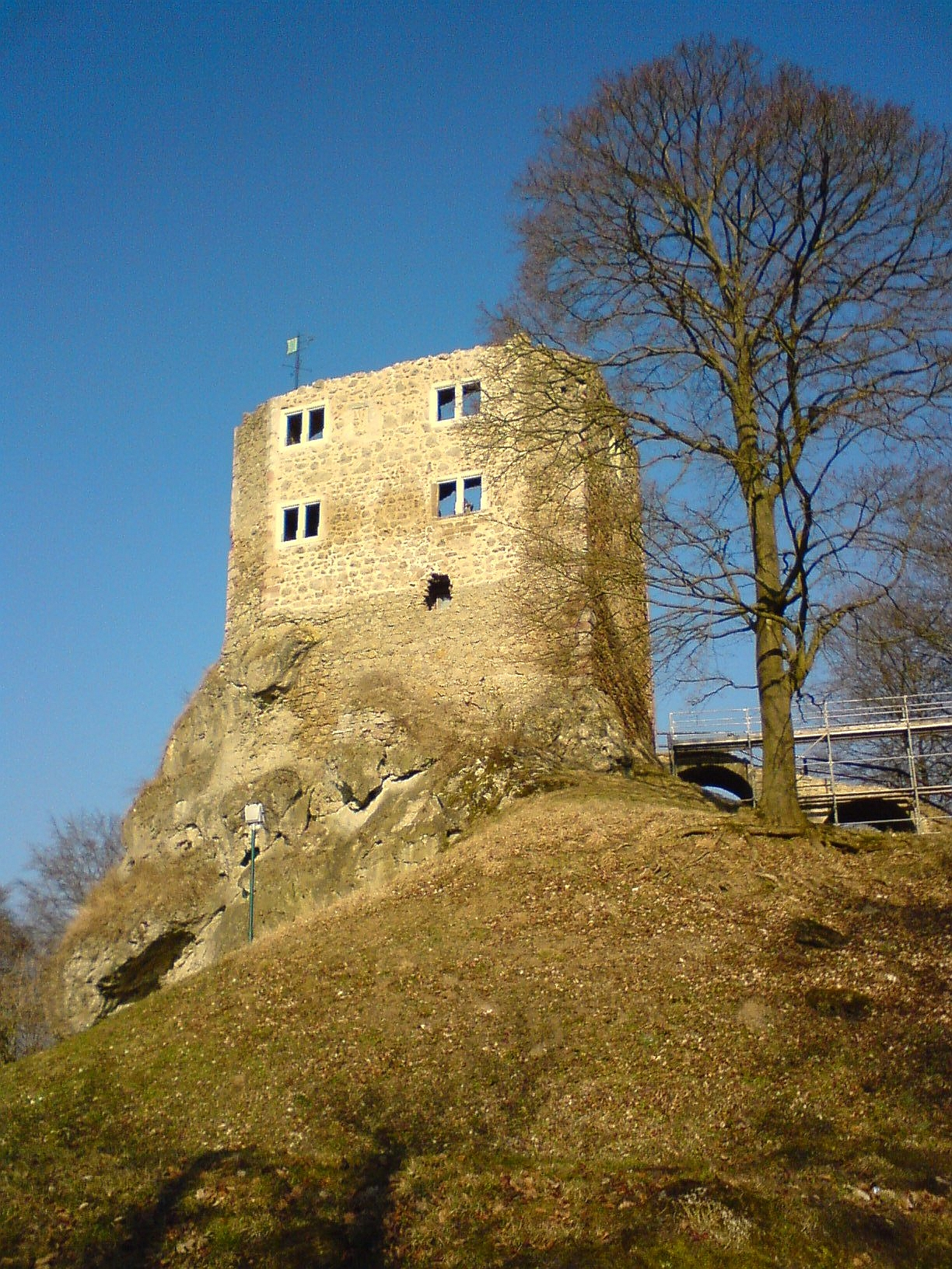 Burgruine Liebenstein bei Bad Liebenstein (Blick aus südwestlicher Richtung)